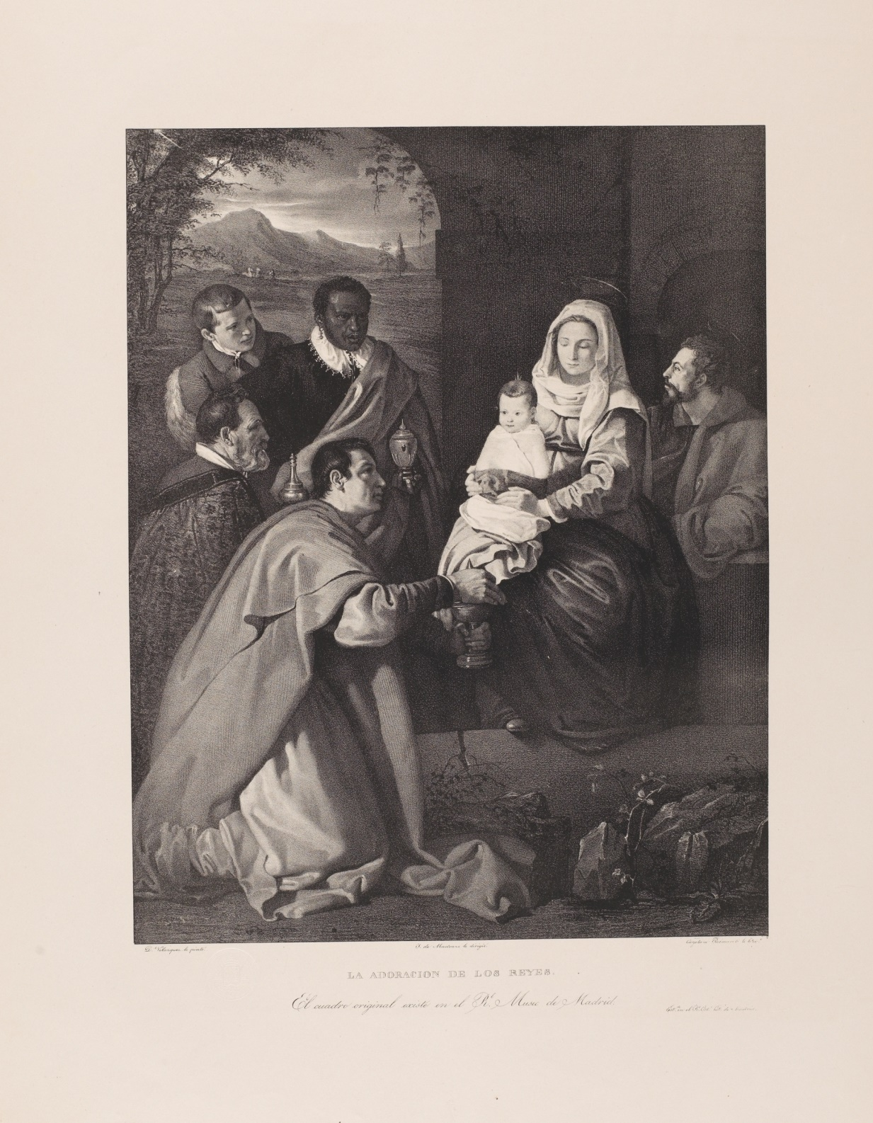 Adoración de los Reyes Magos. Aguatinta litográfica. Cayetano Palmaroli litografió, Diego Velázquez pintó. Madrid, Museo del Prado